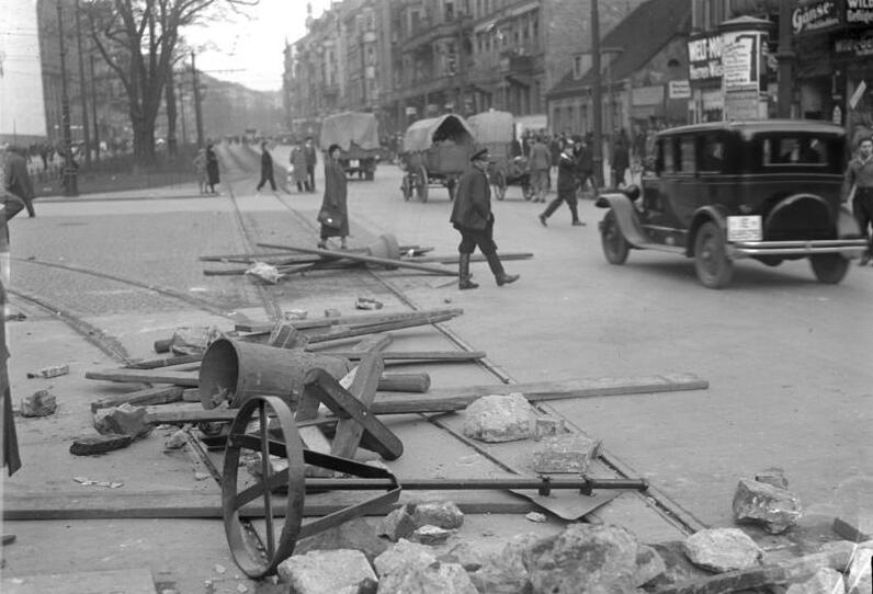 Grosse Streik-Unruhen in Berlin ! Der Verkehrsstreik der Berliner Strassenbahn, Untergrundbahn und Autobusse, welcher schon Menschenopfer gefordert hat, dauert an. Von Streikenden errichtete Barrikade auf den Schienen der Strassenbahn in Berlin.